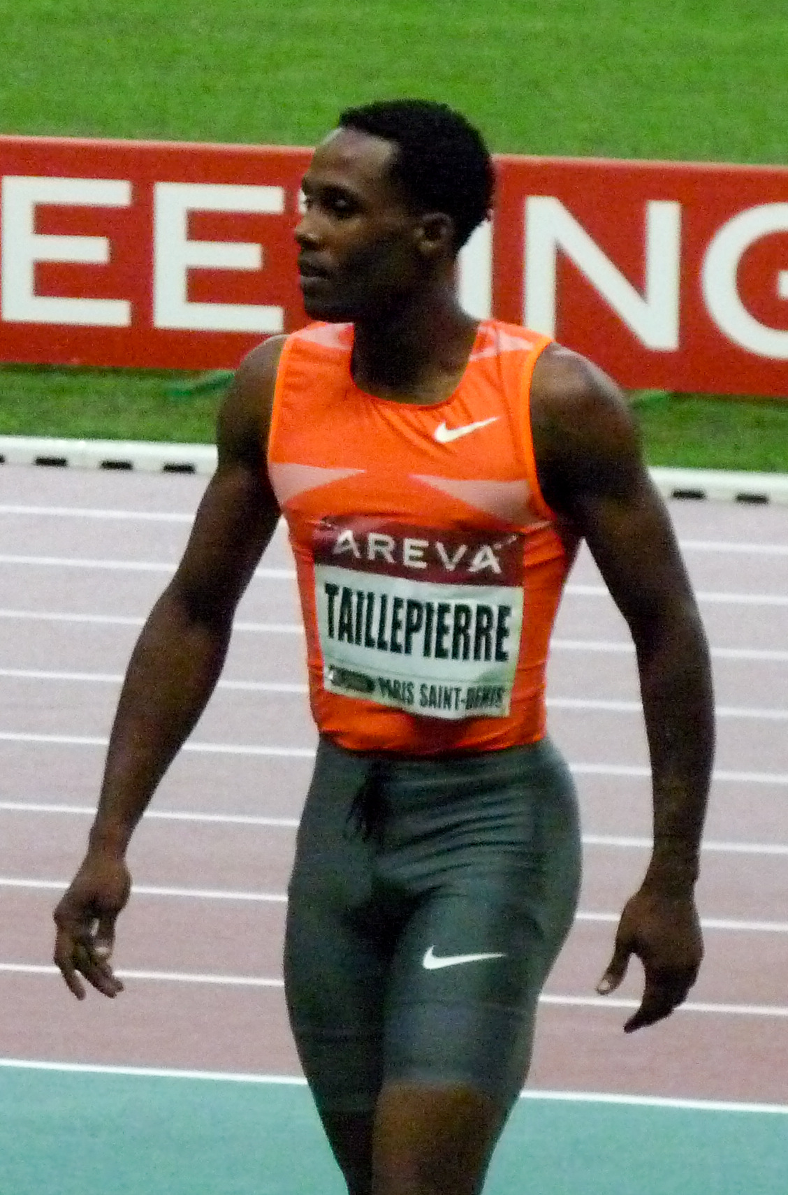 Karl Taillepierre lors du meeting Areva 2009